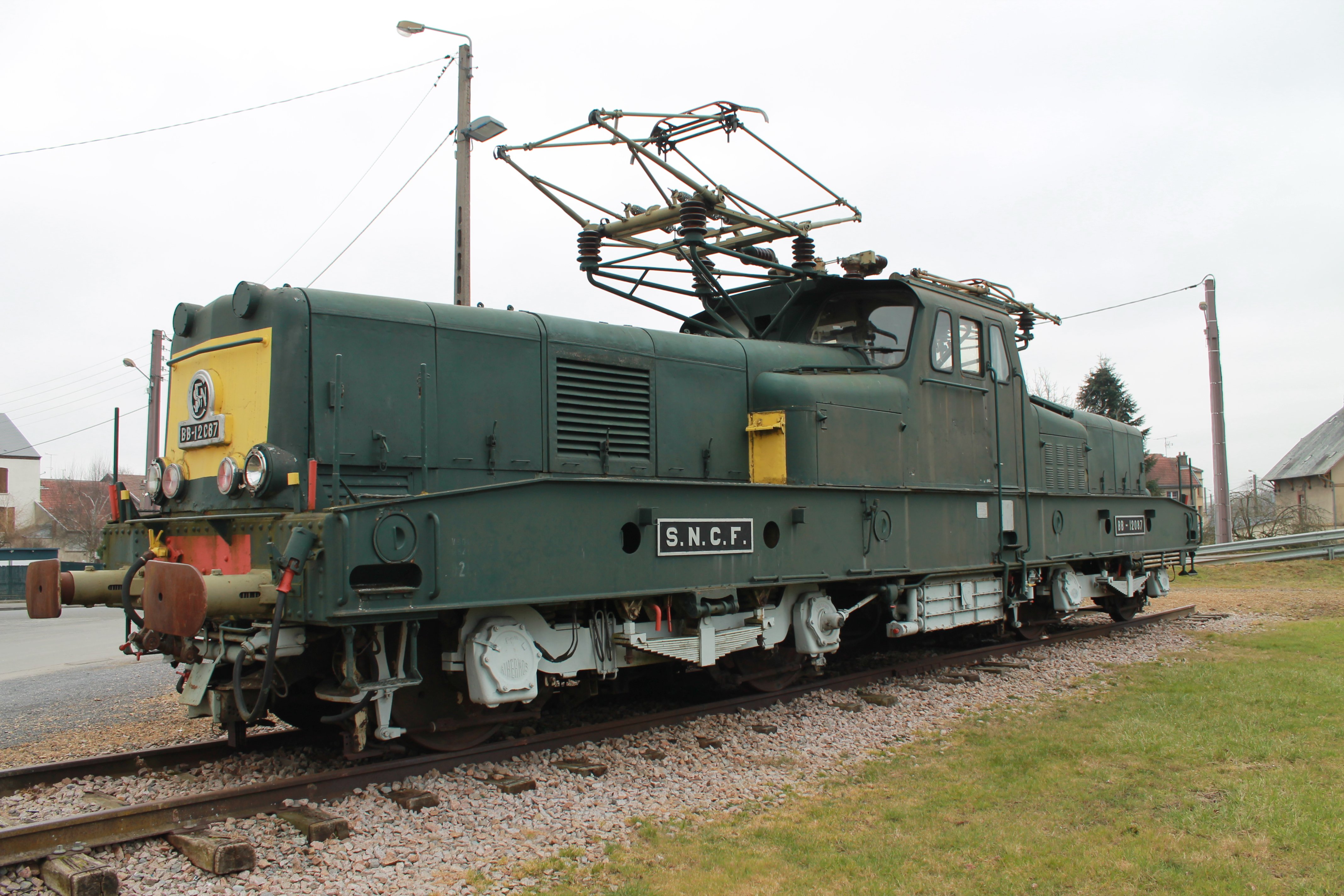 Locomotive BB-12000, à l'entrée de Nouvion-sur-Meuse. Elle est exposée devant la mairie en hommage au passé cheminot de la ville.